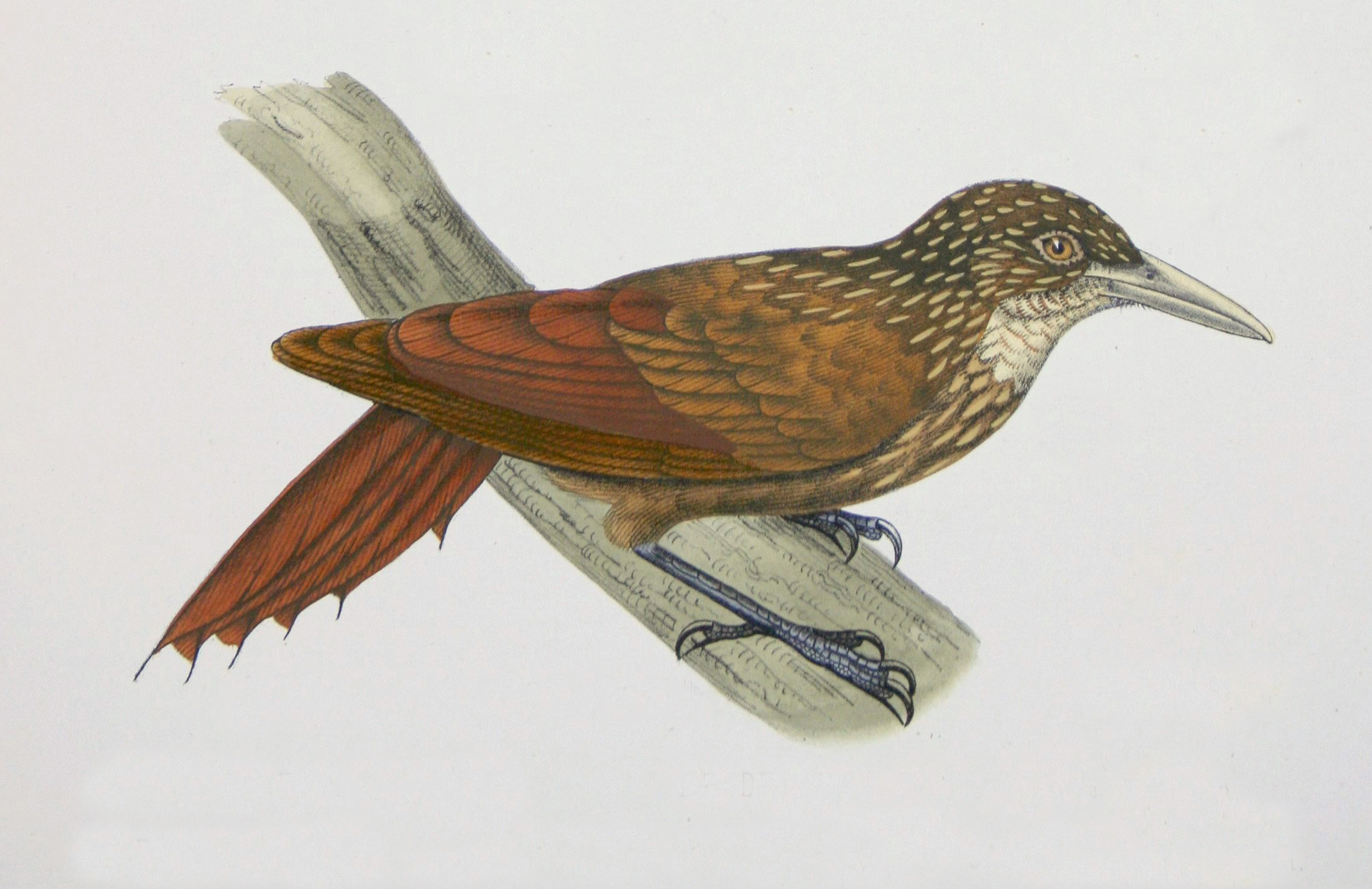 Dendrornis palliatus = Xiphorhynchus obsoletus palliatus